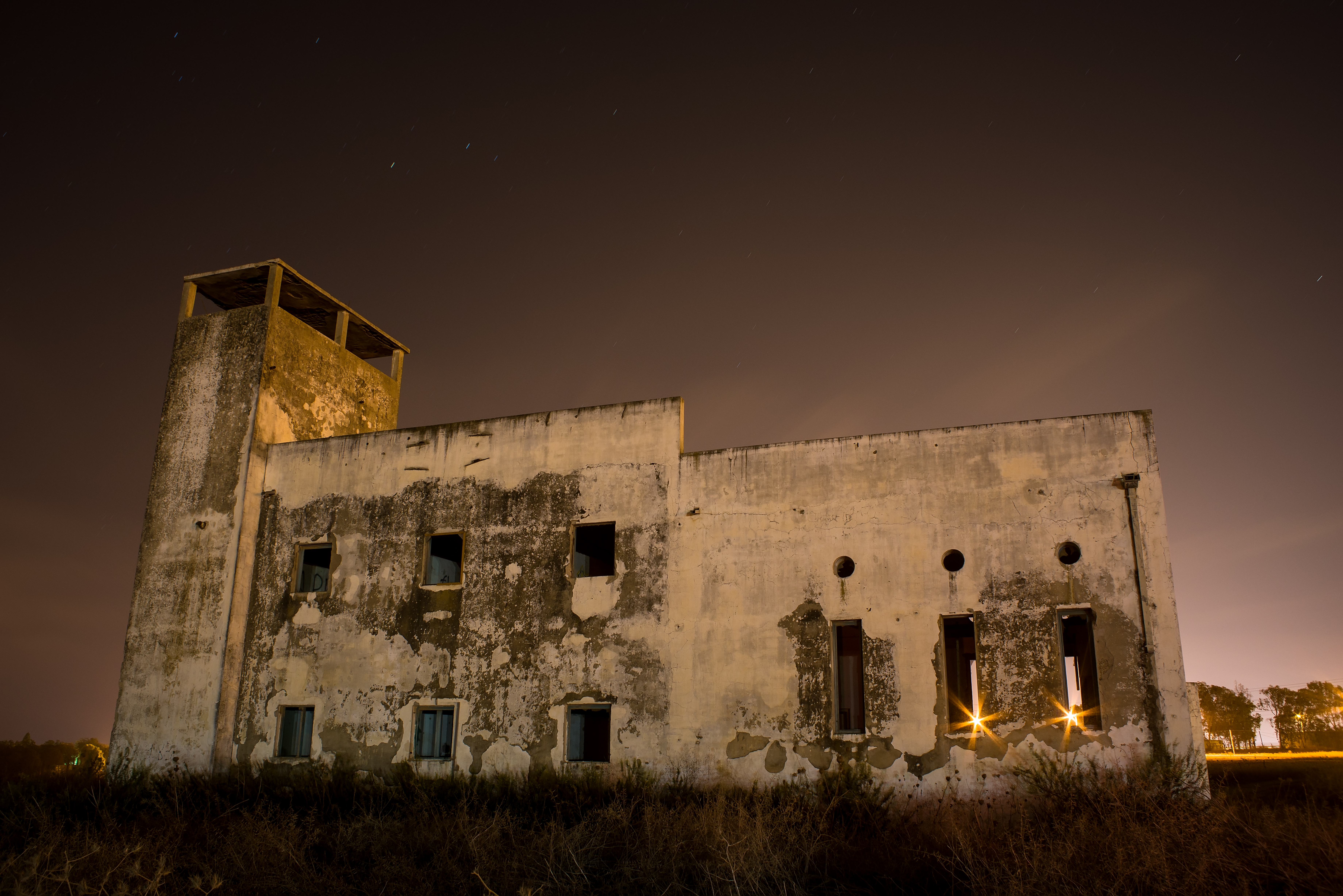 מחנה ישראל (דברת) היה קומונה של פועלי אגודת ישראל שהתארגנה לקראת חיי קיבוץ. אנשי הקבוצה התיישבו על אדמה שנרכשה בשנת 1925 בעמק יזרעאל, ליד קיבוץ דברת של היום.